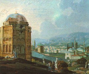 Карло Боссоли. Бахчисарай. 1820-е